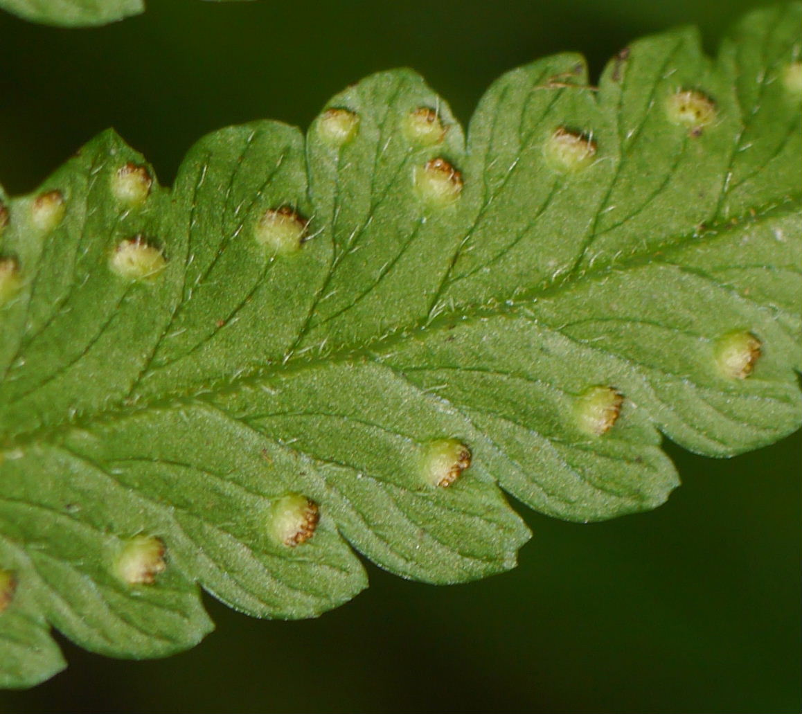 Microlepia marginata：フモトシダ 2015/07/19 和歌山県田辺市：Tanabe City. Wakayama Pref. Japan